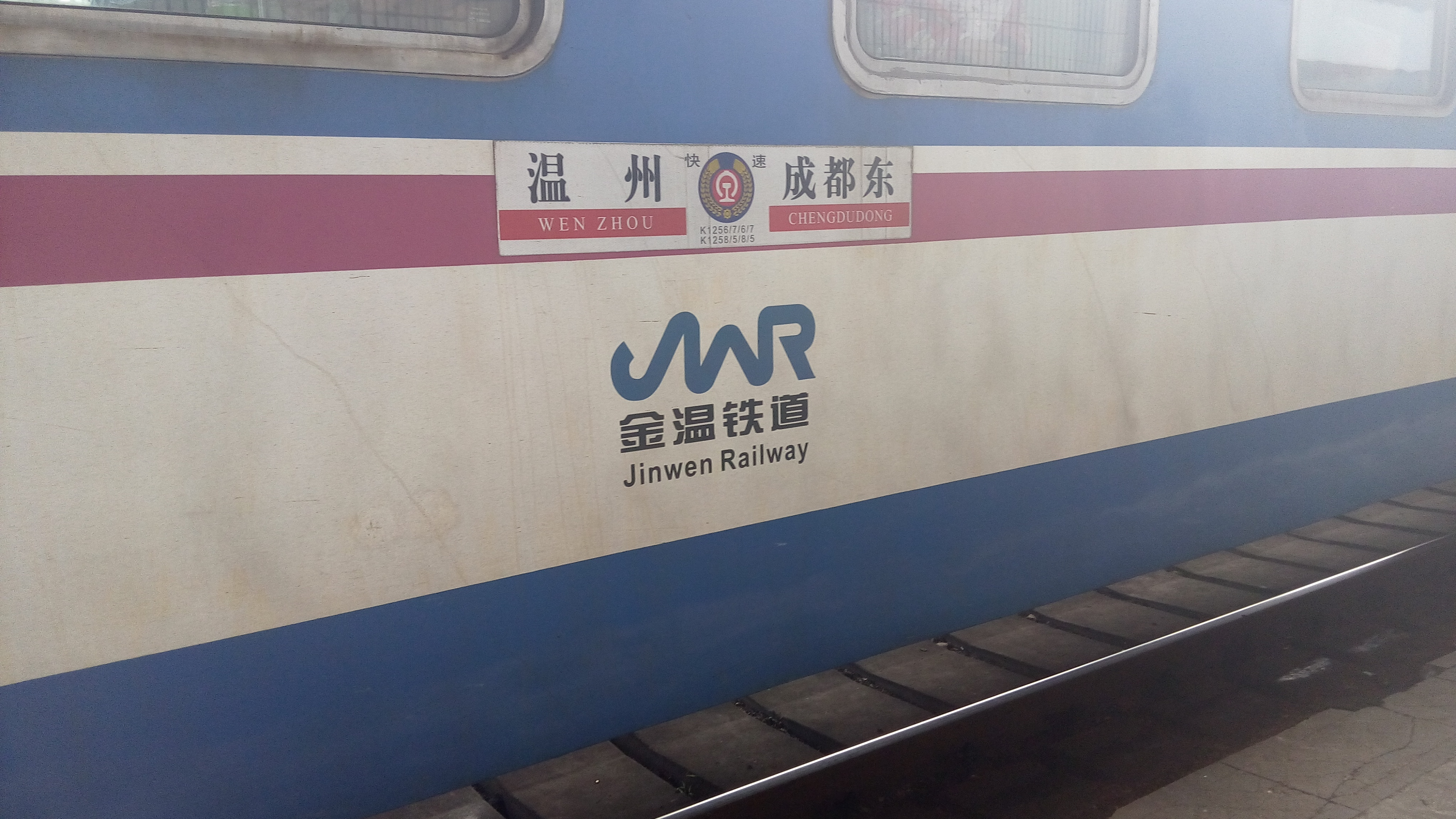 K1256/K1258列车 停靠在4站台9道